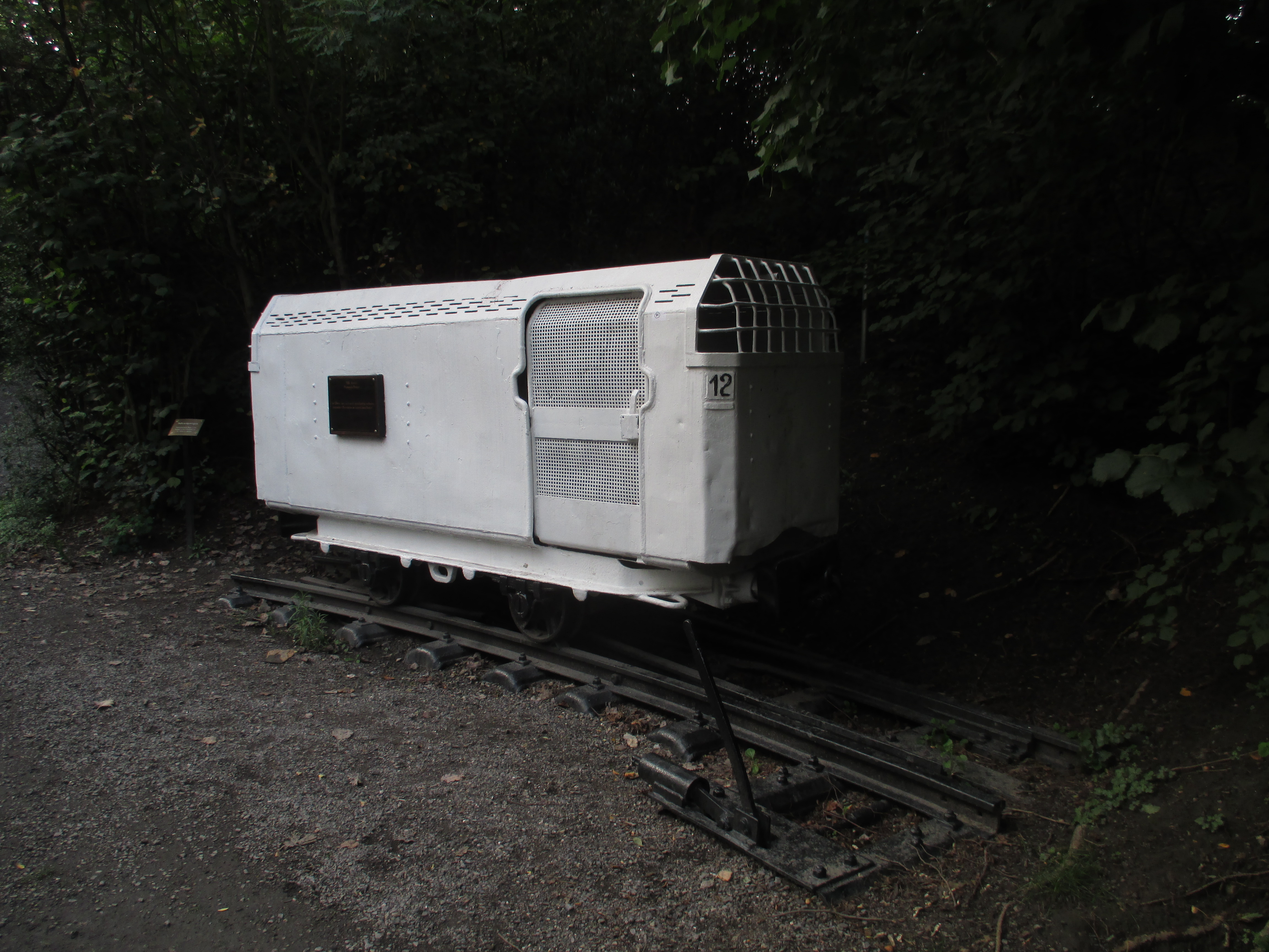 Station 8 des Bergbaukreuzweges an der Halde Haniel in Bottrop.